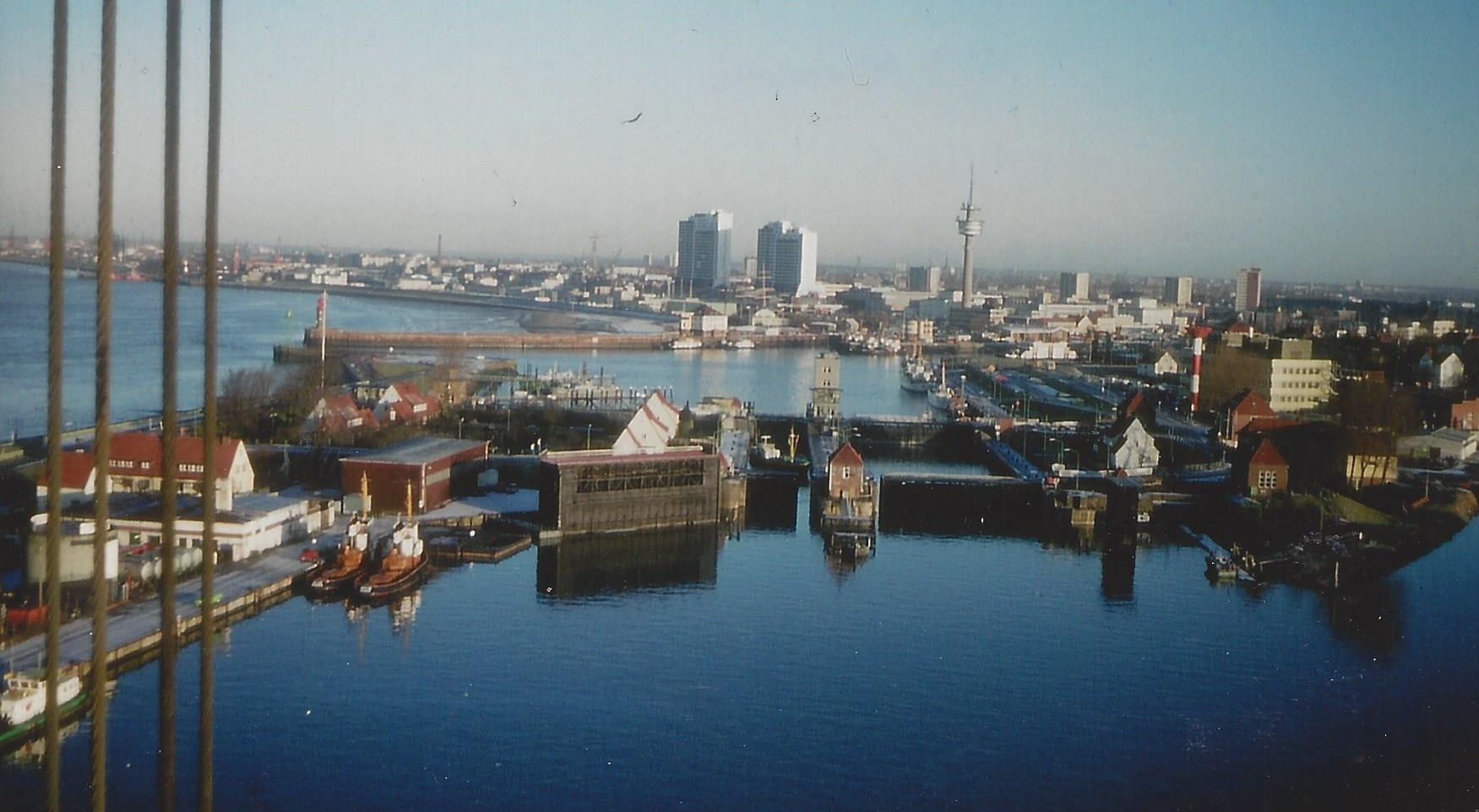 Fotografie der Geestemündung und der Doppelschleuse vom Fischereihafen in Bremerhaven, davor ein Ersatztor. Links stehen noch die Schleusenwärterhäuser und die alten Bäume. Fotografiert vom Schwimmkran Enak.